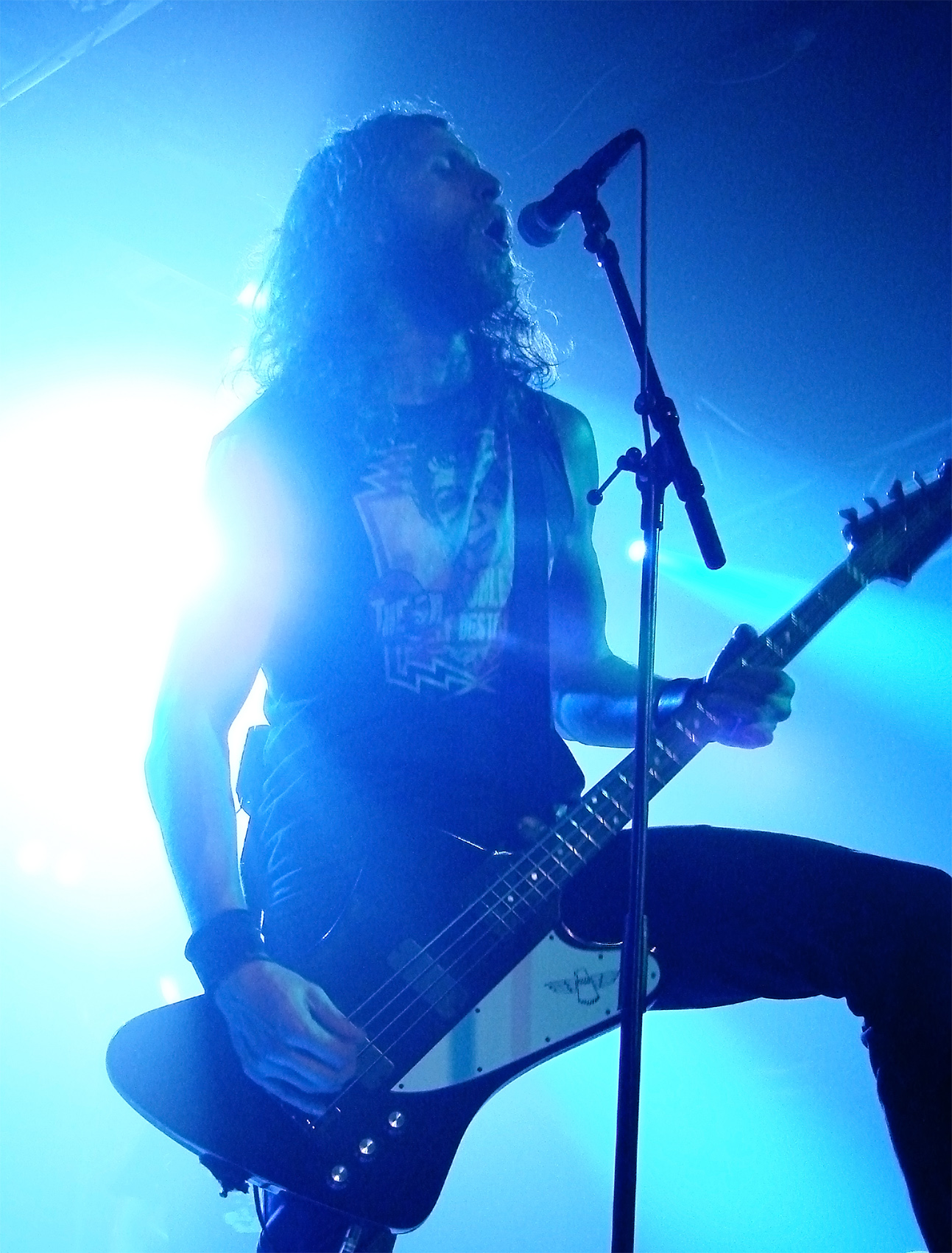 Soilwork en concert à Paris, à la Locomotive, le 12/10/07.